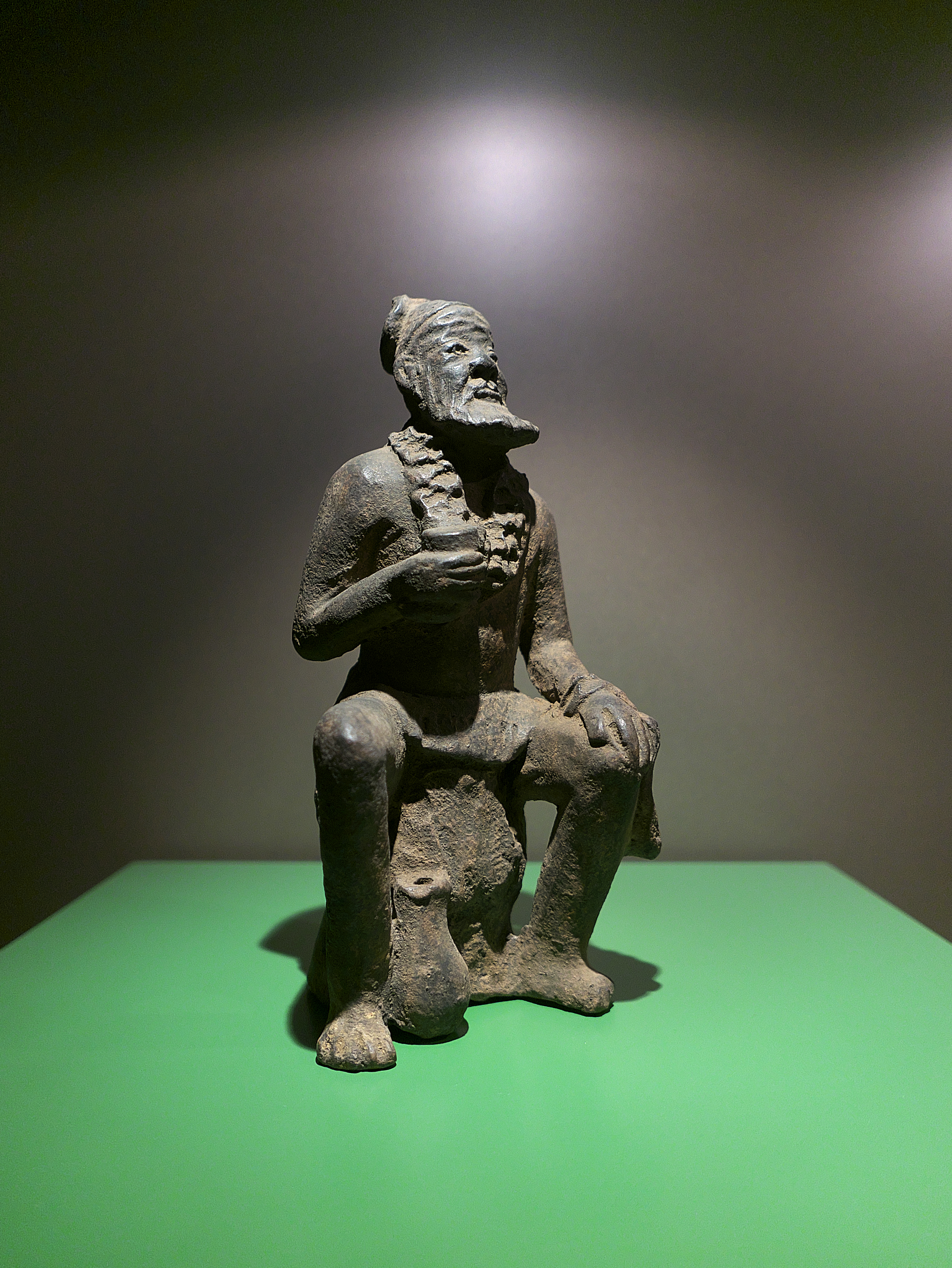 Fetiche de terracota, ungido con pasta de camwood por el jefe que le transmite la fuerza vital.